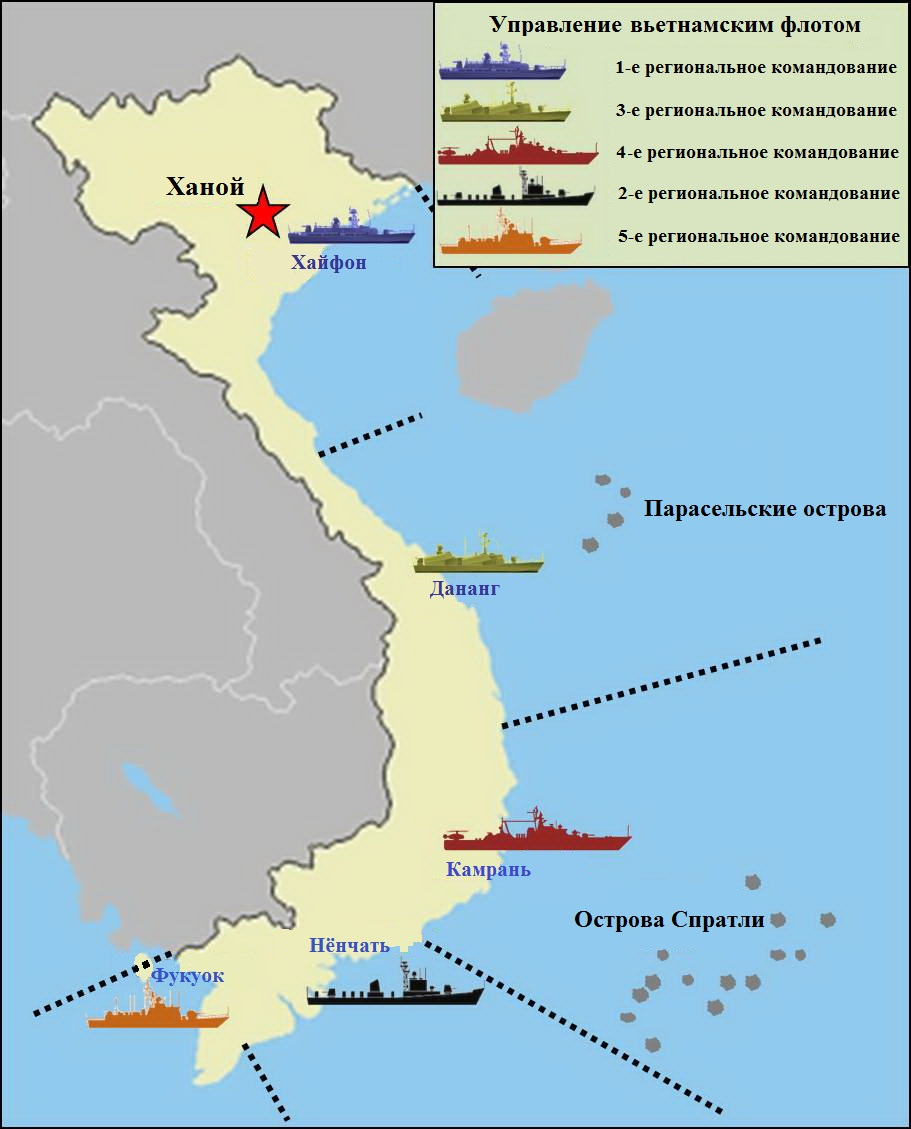 Военно-морские регионы вьетнамского народного флота